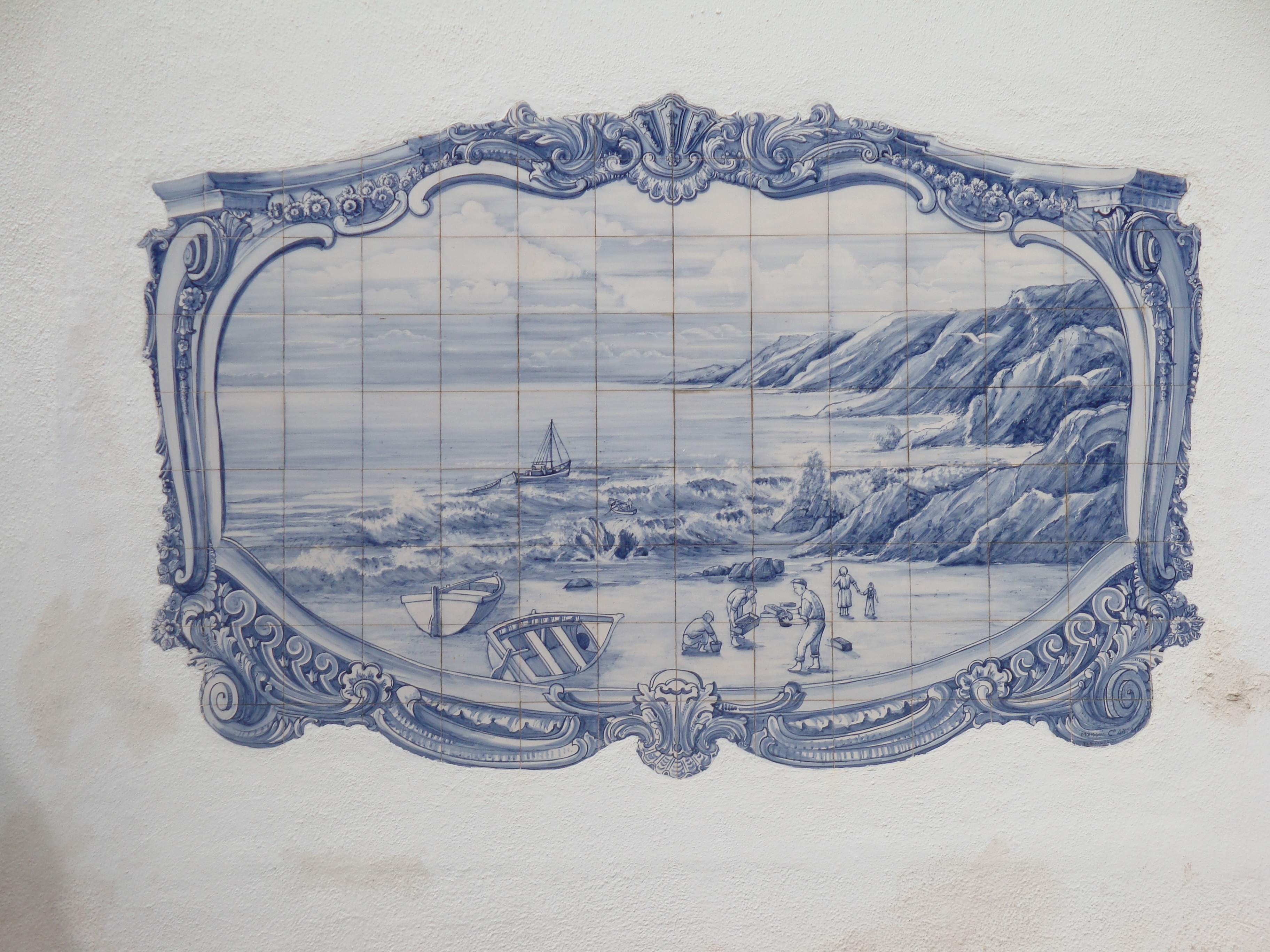 Azulejo representando a Praia da Adraga, Portugal